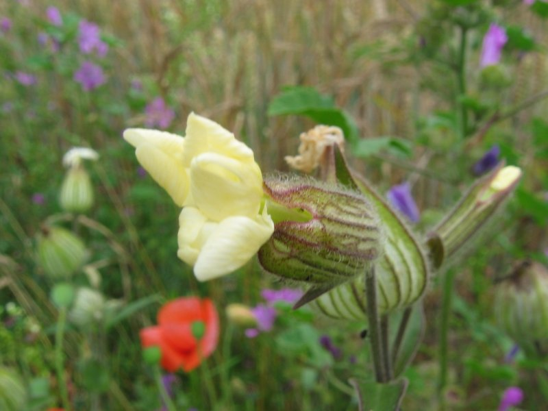 Silene latifolia, Kristian Peters